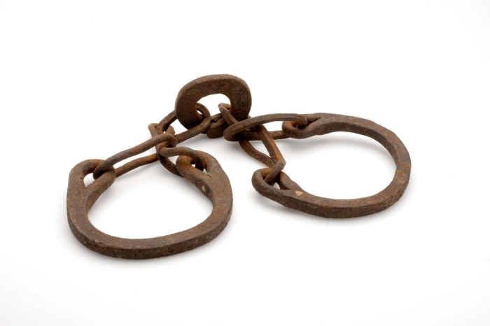 De voetring wordt gebruikt om mensen in het dorp gevangen te zetten. Meestal worden dit type voetringen gebruikt om ze een nacht vast te houden. De gevangene kon hiermee alleen schuifelend vooruitkomen. Indien de banden eenmaal om de voeten waren bevestigd kon slechts de smid ze weer losmaken.